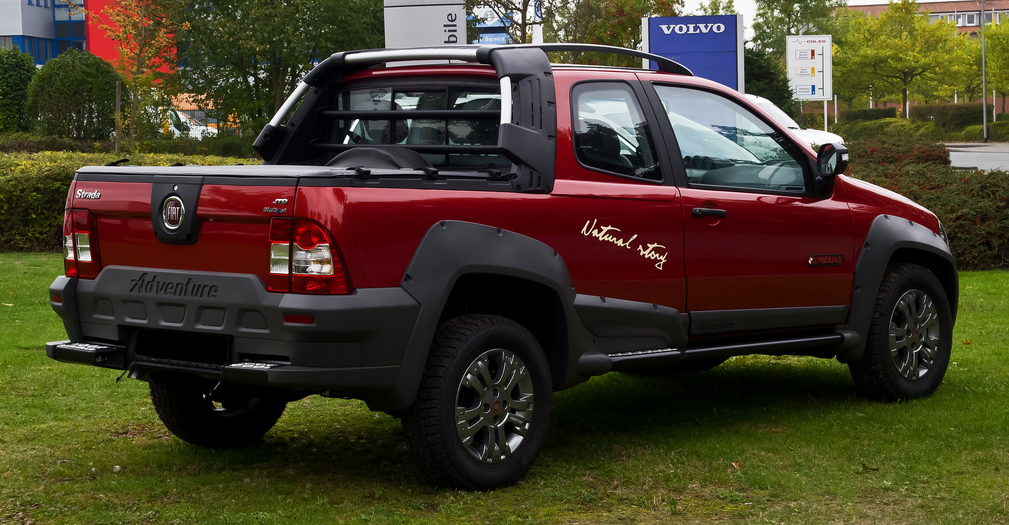 Fiat Strada Adventure 1.3 JTD Multijet Lumberjack (IV)